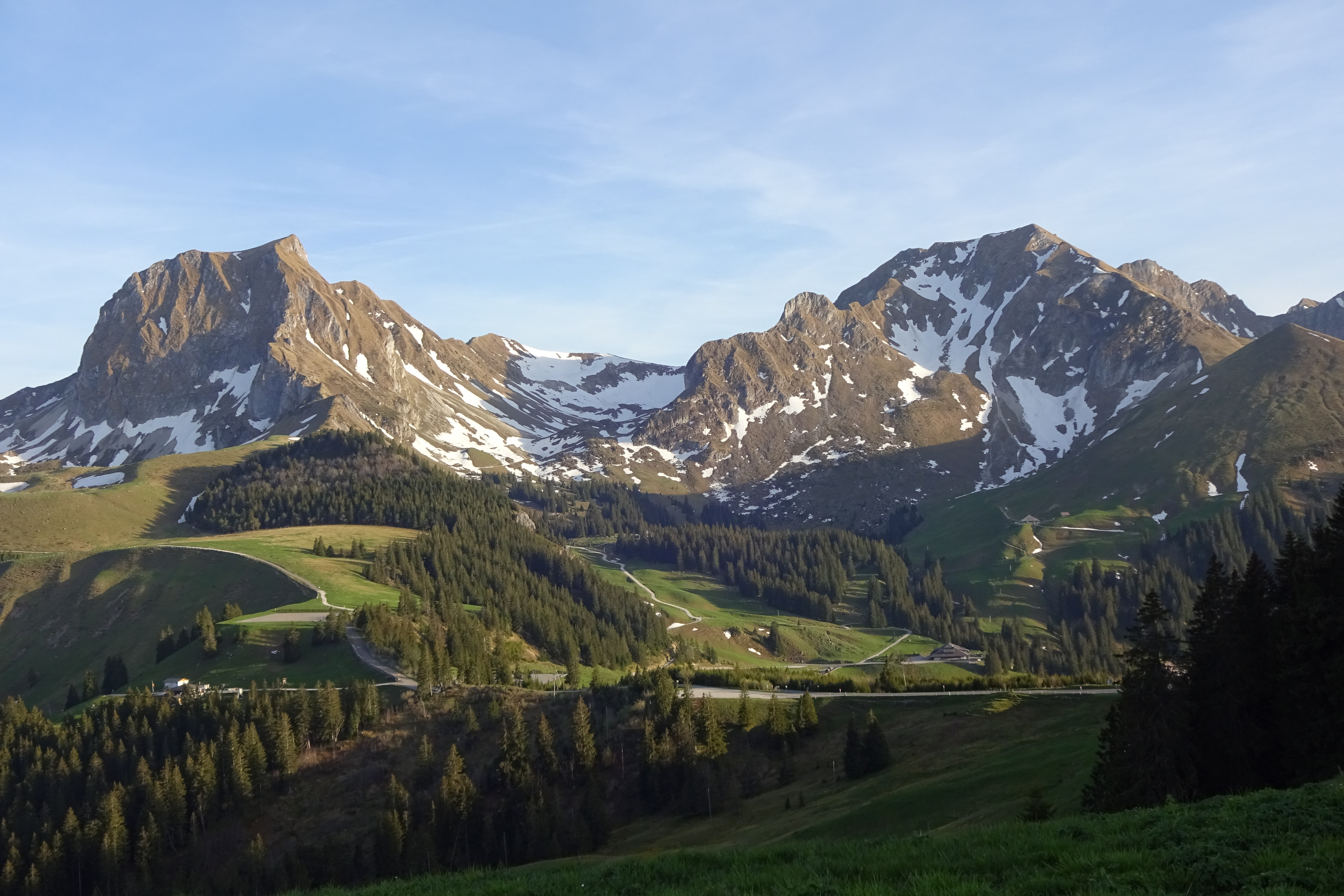 Naturpark Gantrisch (Nr. 1011P) – Gantrischkette von Norden: Gantrisch (links), Kummlispitz (Mitte), Bürglen (rechts), & Gemsfluh (ganz rechts) _ Aufnahmestandort: Rüeggisberg (Exklave Nünenenalp), Gurnigel Stierenberg/Wasserscheide, am Selibühl-Rundweg – 46°43'49.24" N / 7°26'36.64" O